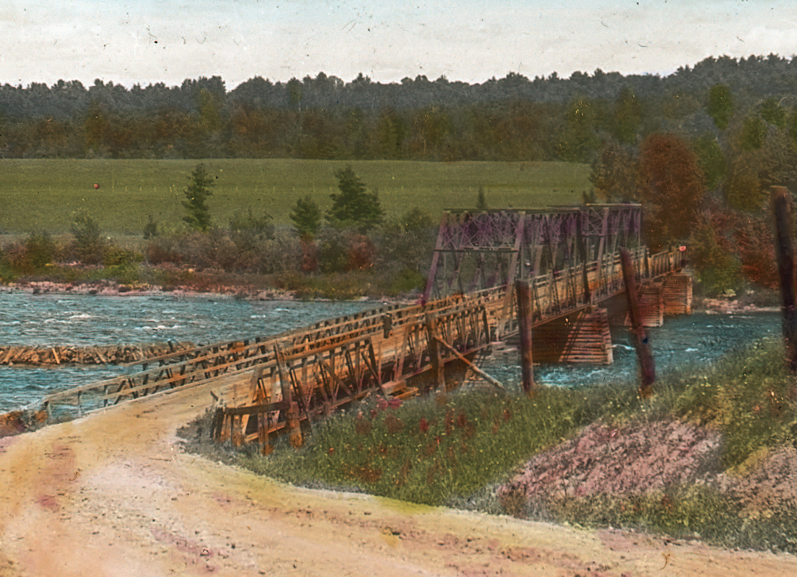 Le pont Alonzo-Wright vu du côté ouest de la rivière en 1920